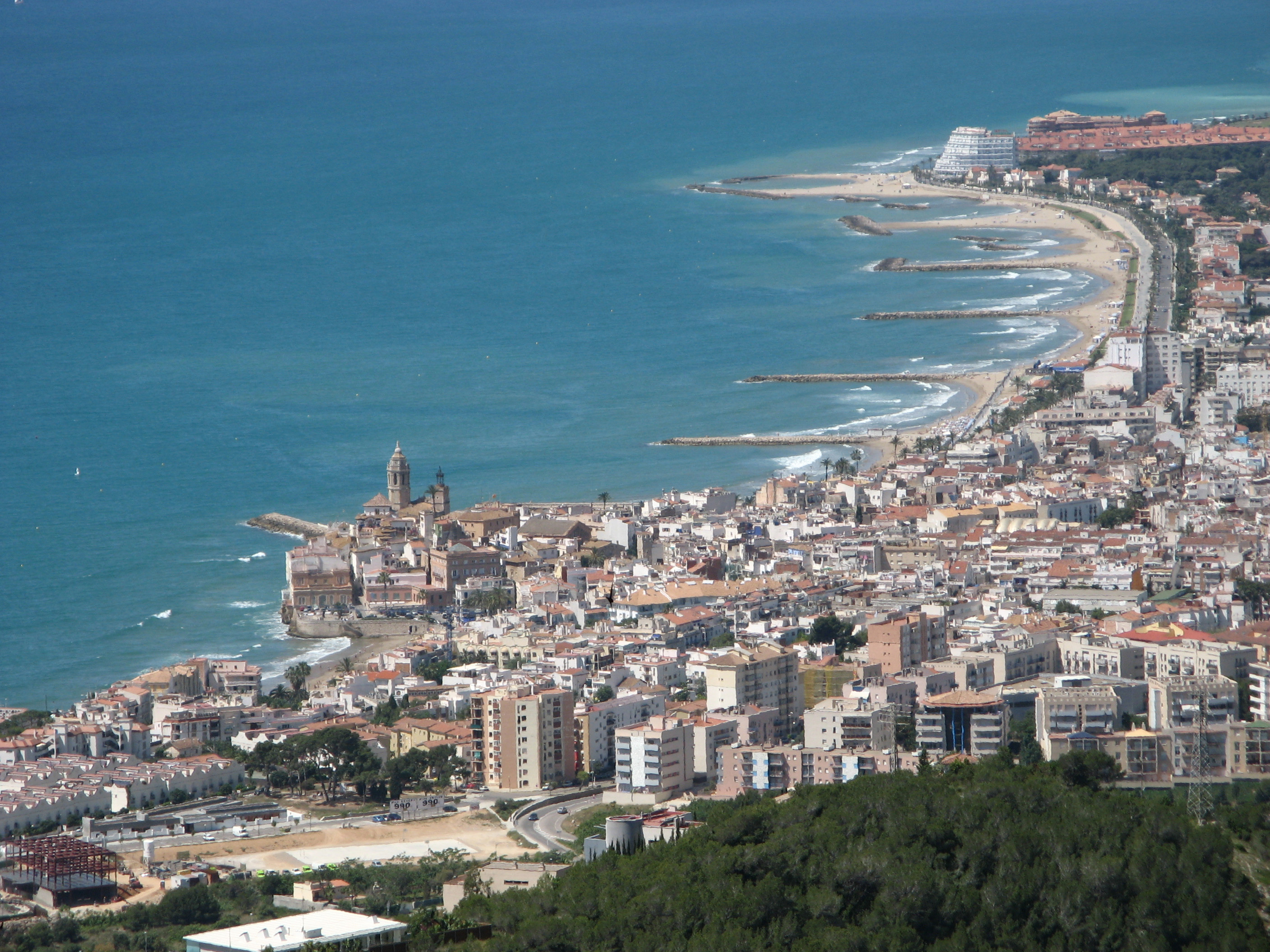 Ansicht von Sitges (Catalonien, Spanien).